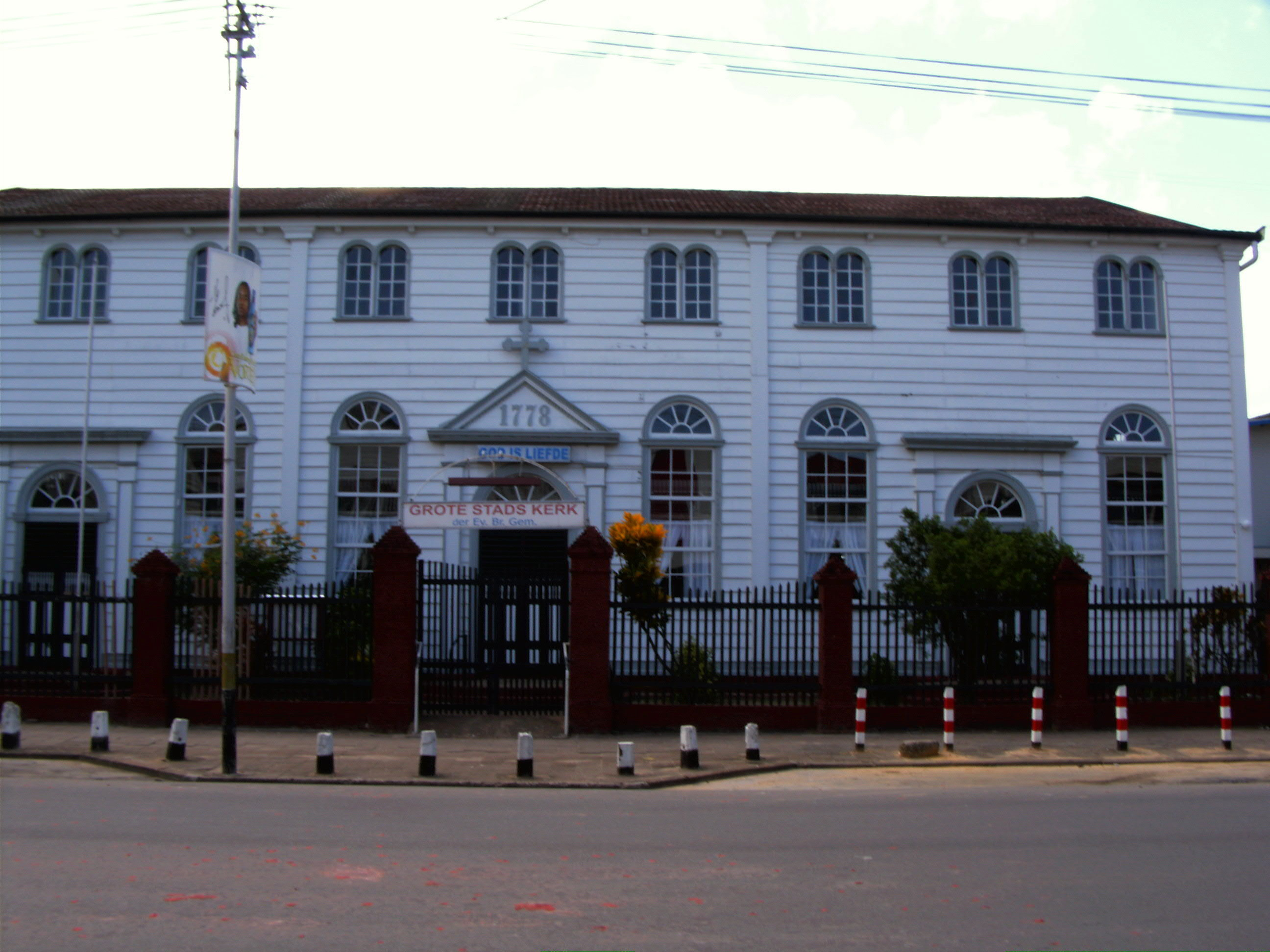 Es zeigt die Große Stadtskirche der evangelischen Brüdergemeine Suriname (EBGS) in Paramaribo.